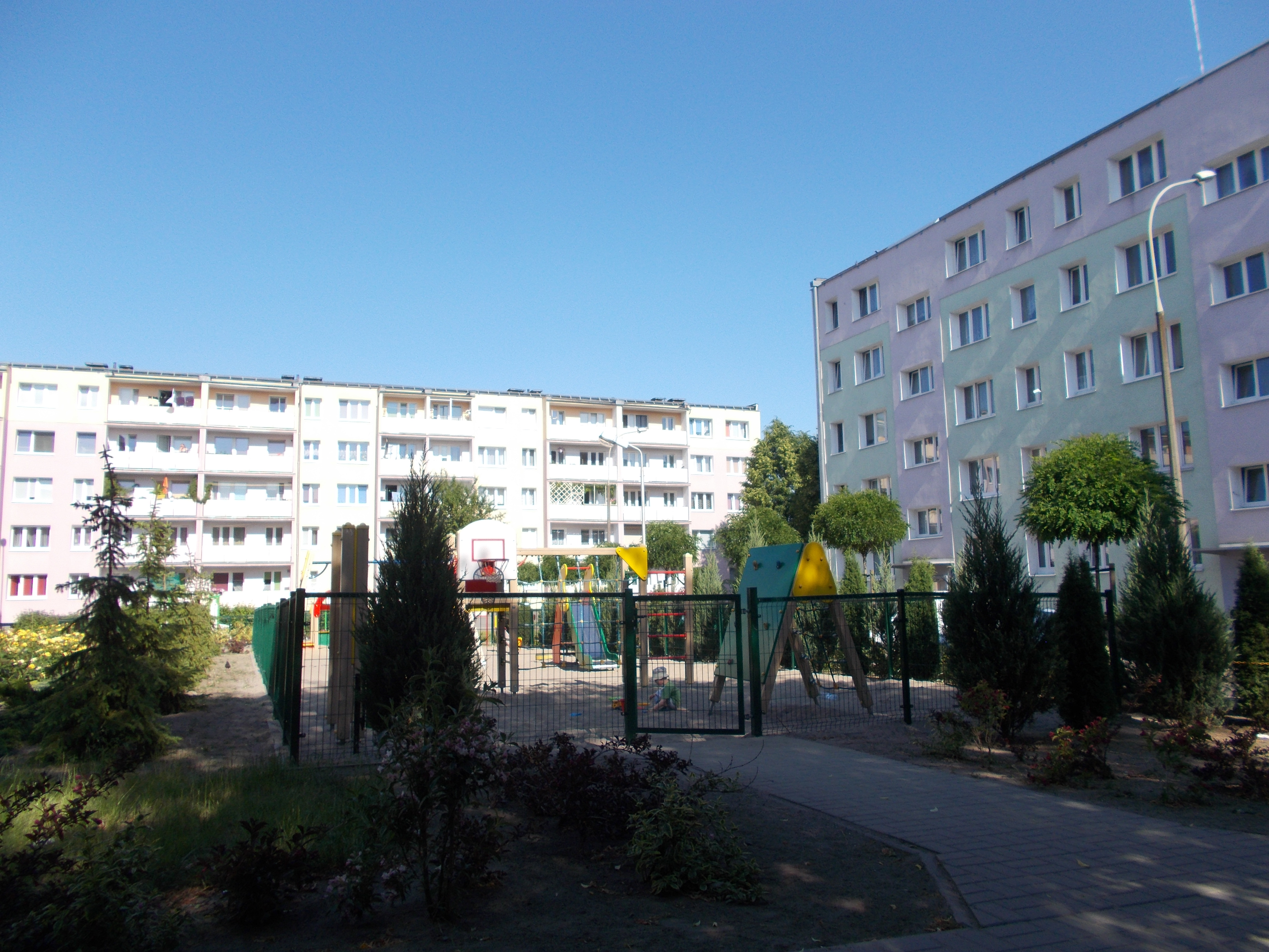 Osiedle Rzeczypospolitej w Poznaniu.